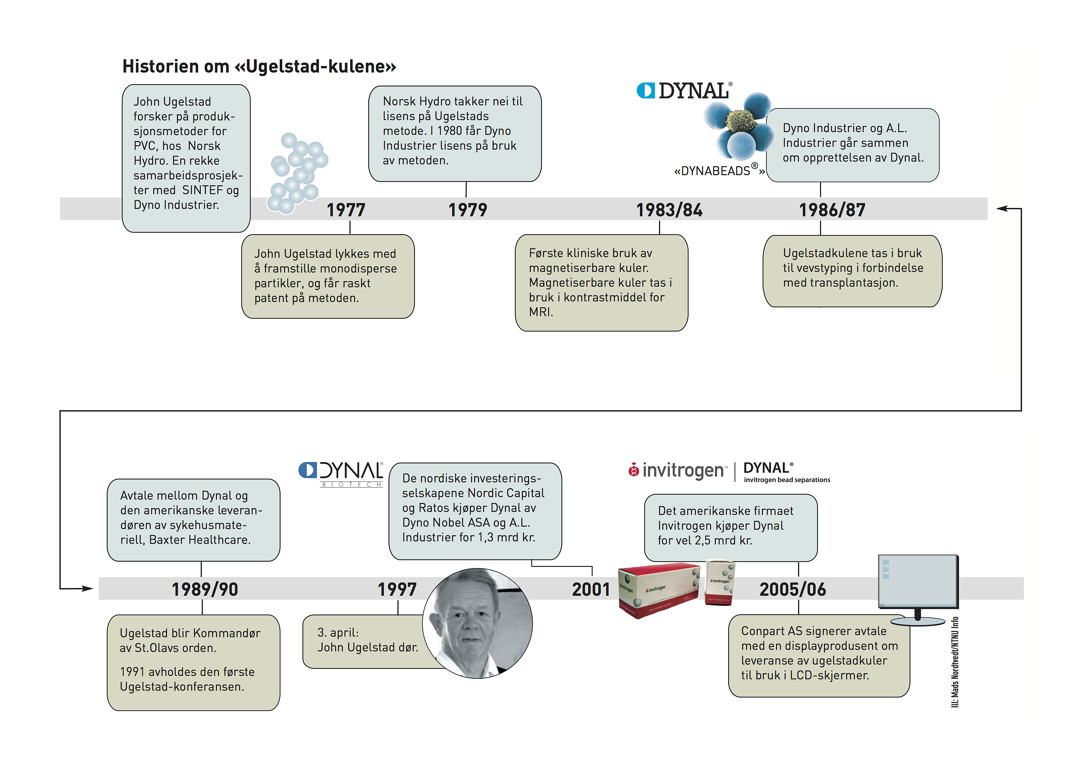 grafisk fremstilling av ugelstadkulenes historie 1977–2005/2006